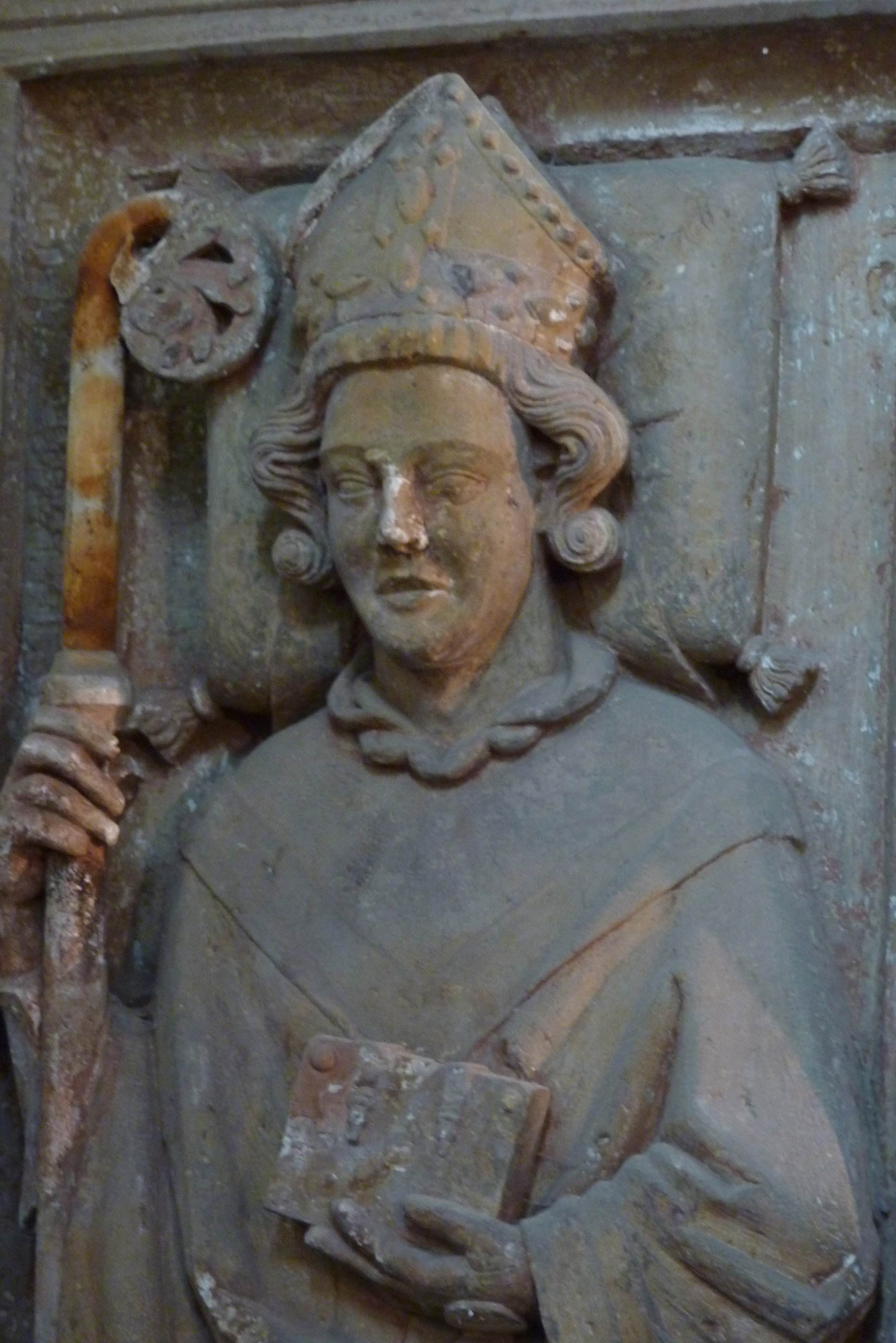 Divi-Blasii-Kirche in Mühlhausen/Thüringen, Epitaph für Kristan von Mühlhausen (gest. 1295)